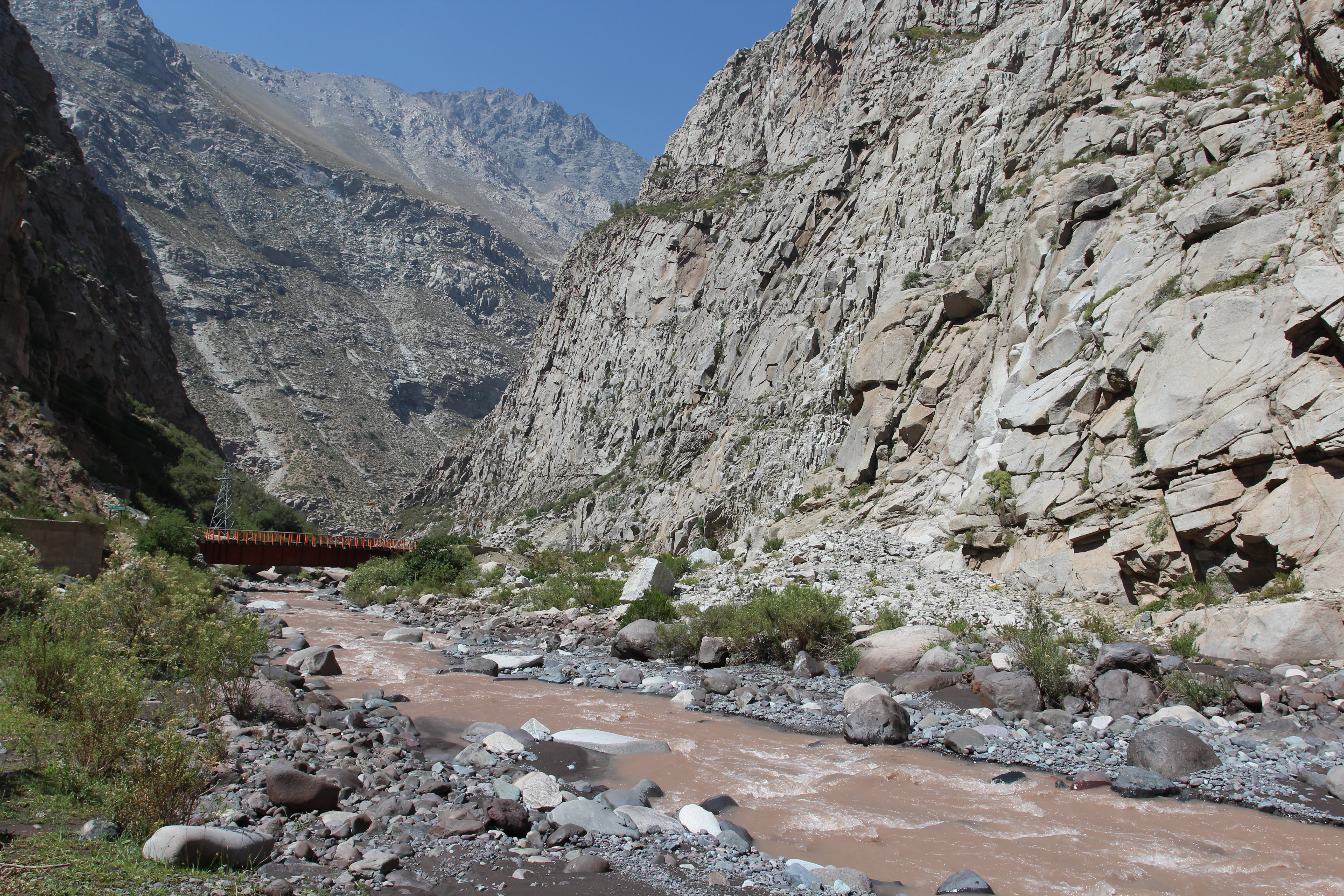 Recorrido por Ruta de Río Olivares